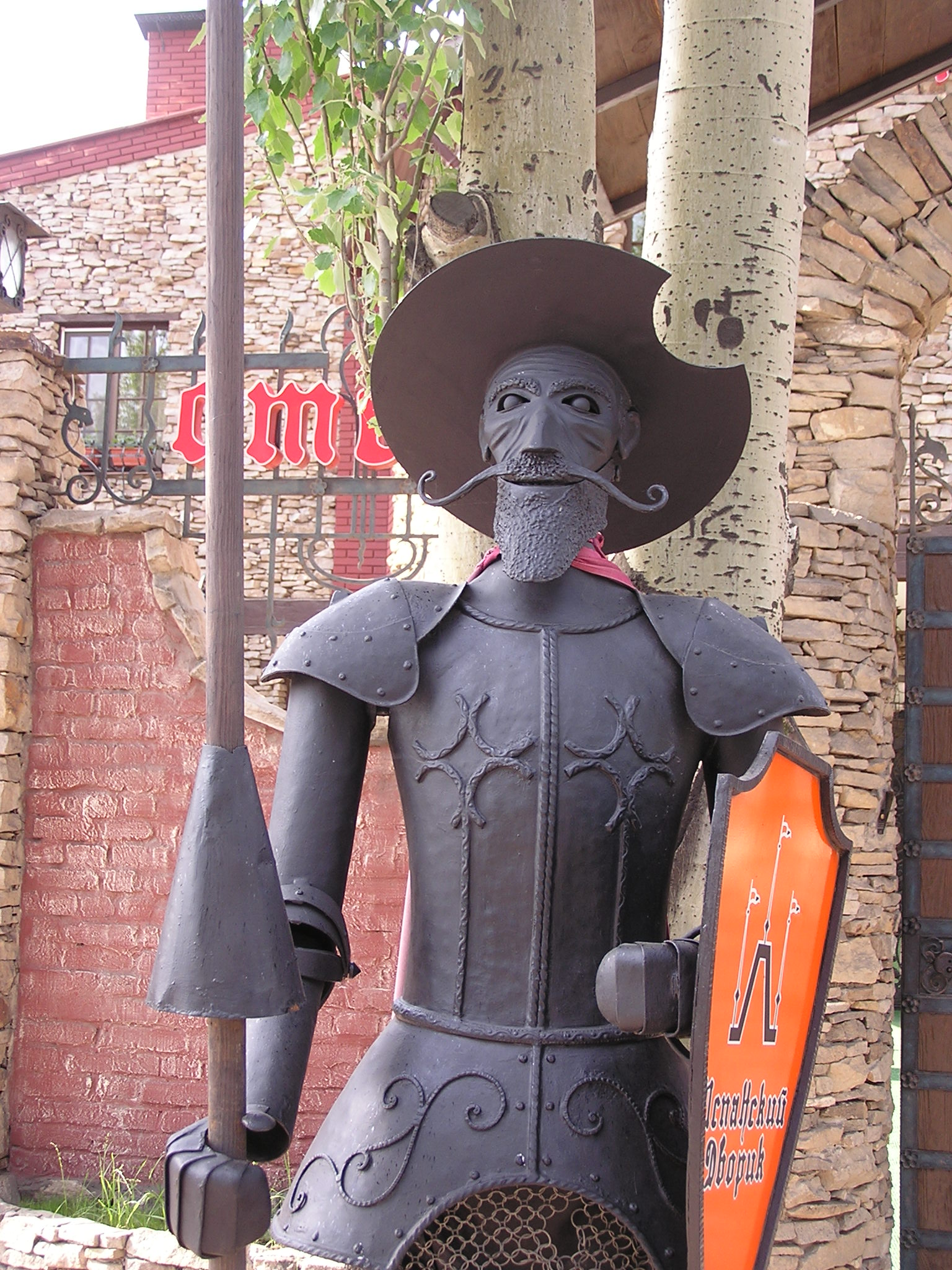 Донецк. Дон Кихот